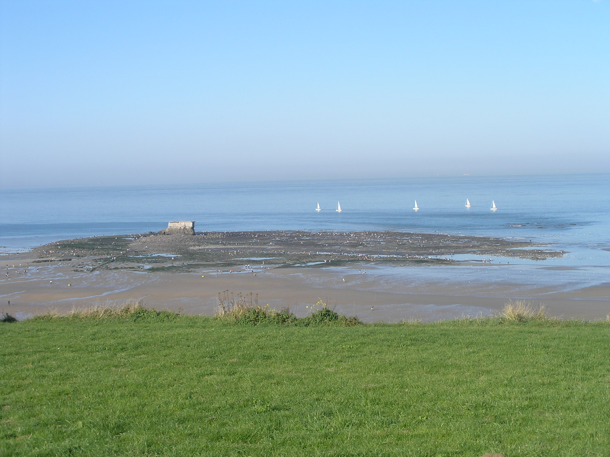 Les rochers du Fort de l'Heurt à Le Portel Plage, Cote d'Opale Pas de Calais France. Moulière naturelle. Chaque été, les estivants profitent sans compter de ce gisement moulier pour quelques bons repas en vacances.